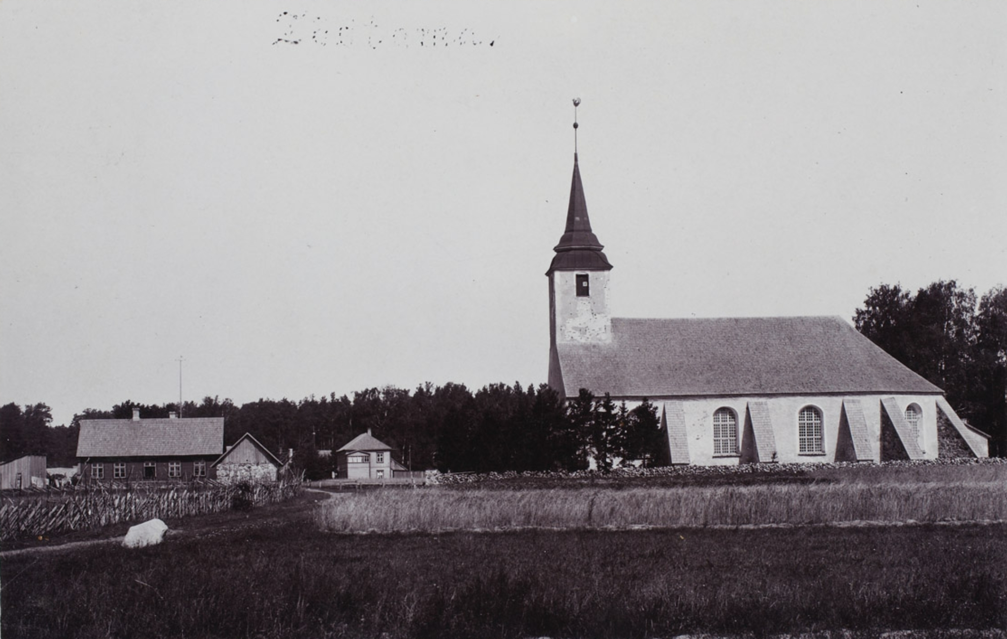 Tõstamaa kirik ja koolimaja 1911. aastal